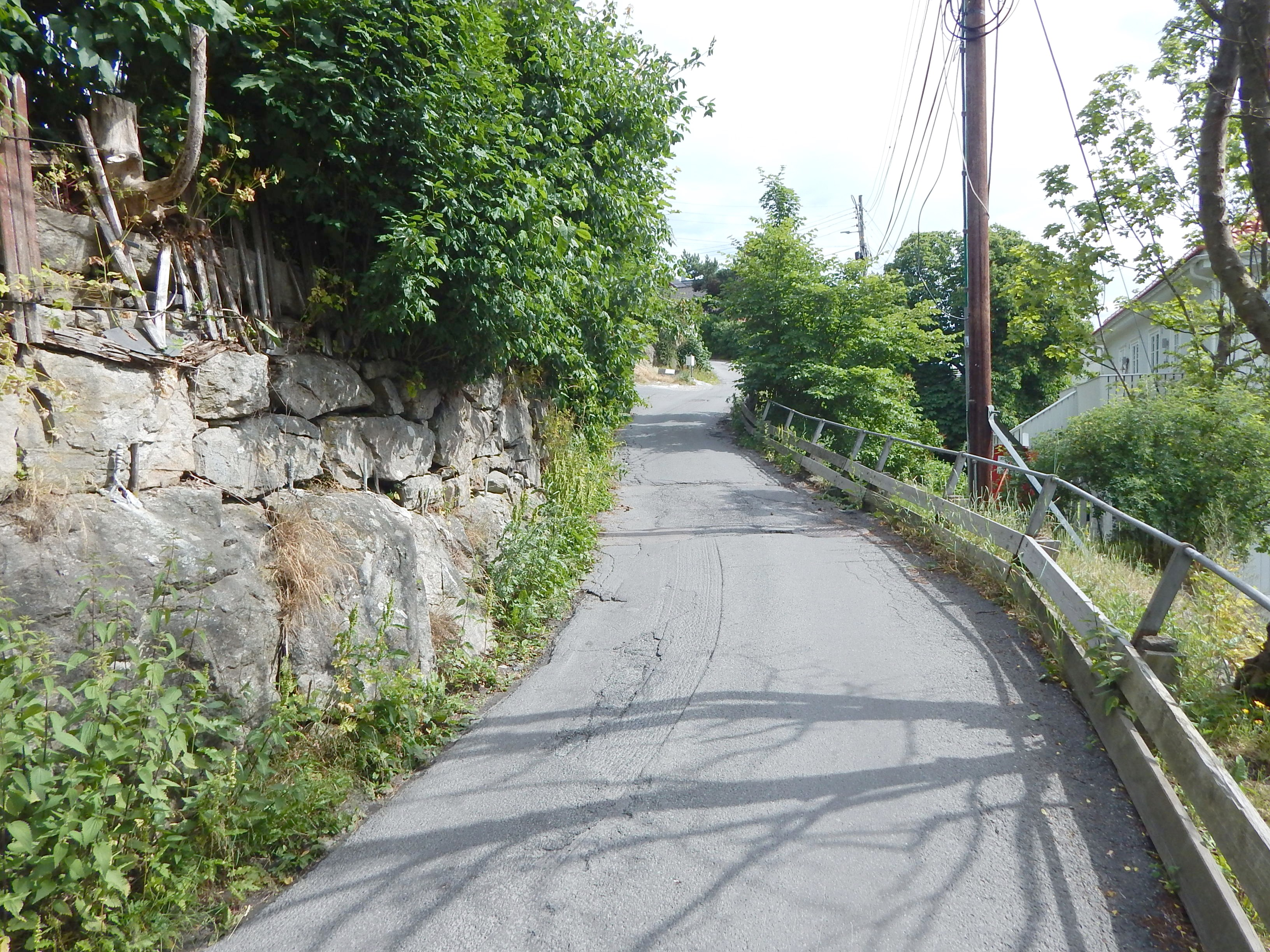 Grottenveien